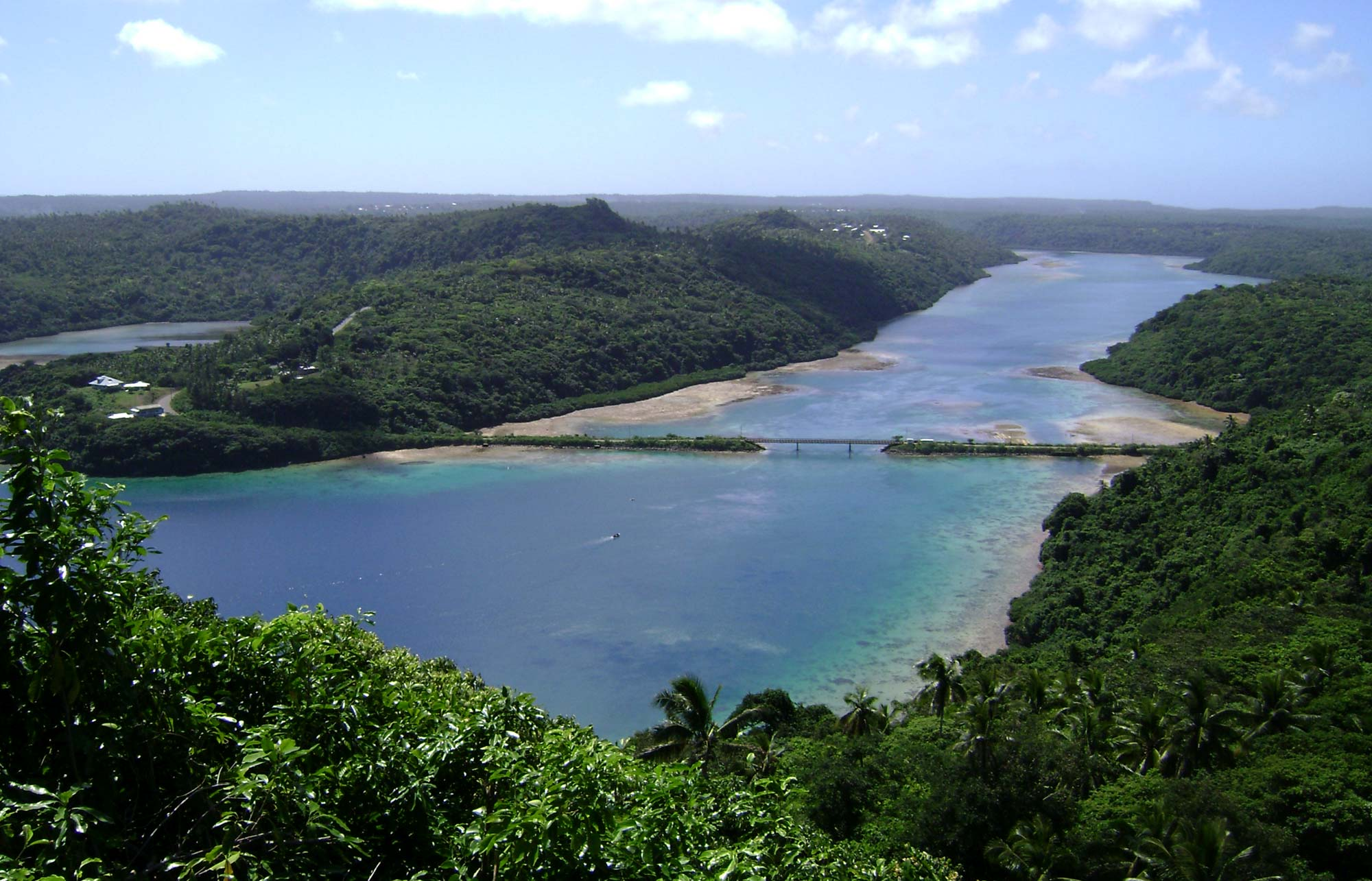 Vaipūua lagoon and bridge Neiafu — Tefisi, Vavaʻu